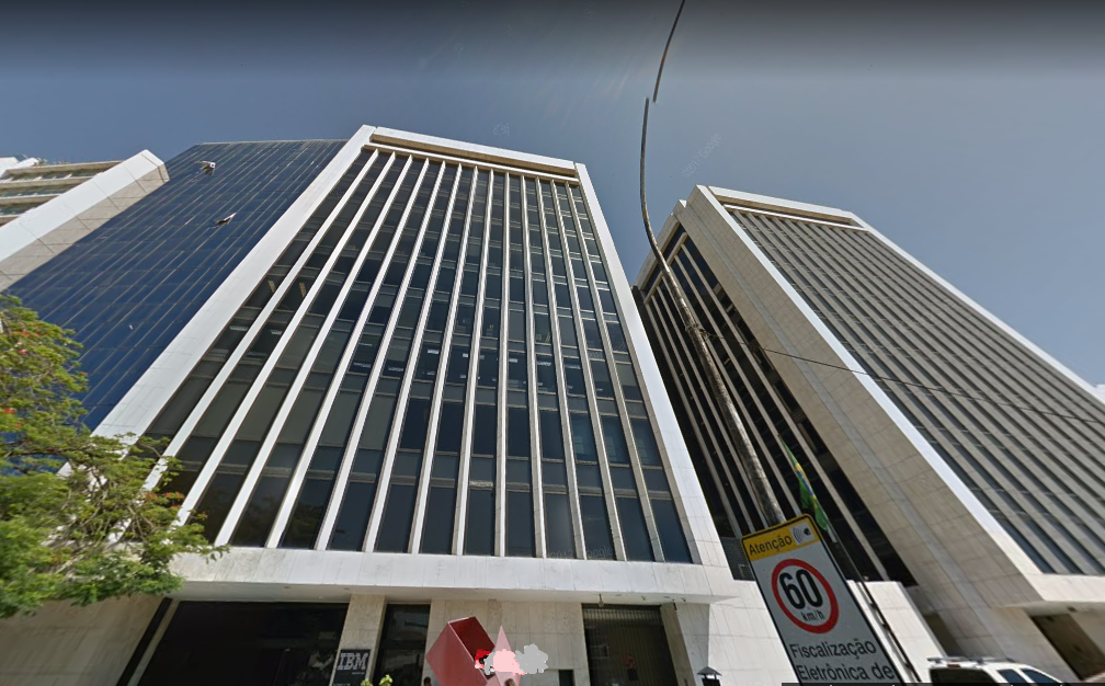 Edifício da IBM no Rio de Janeiro